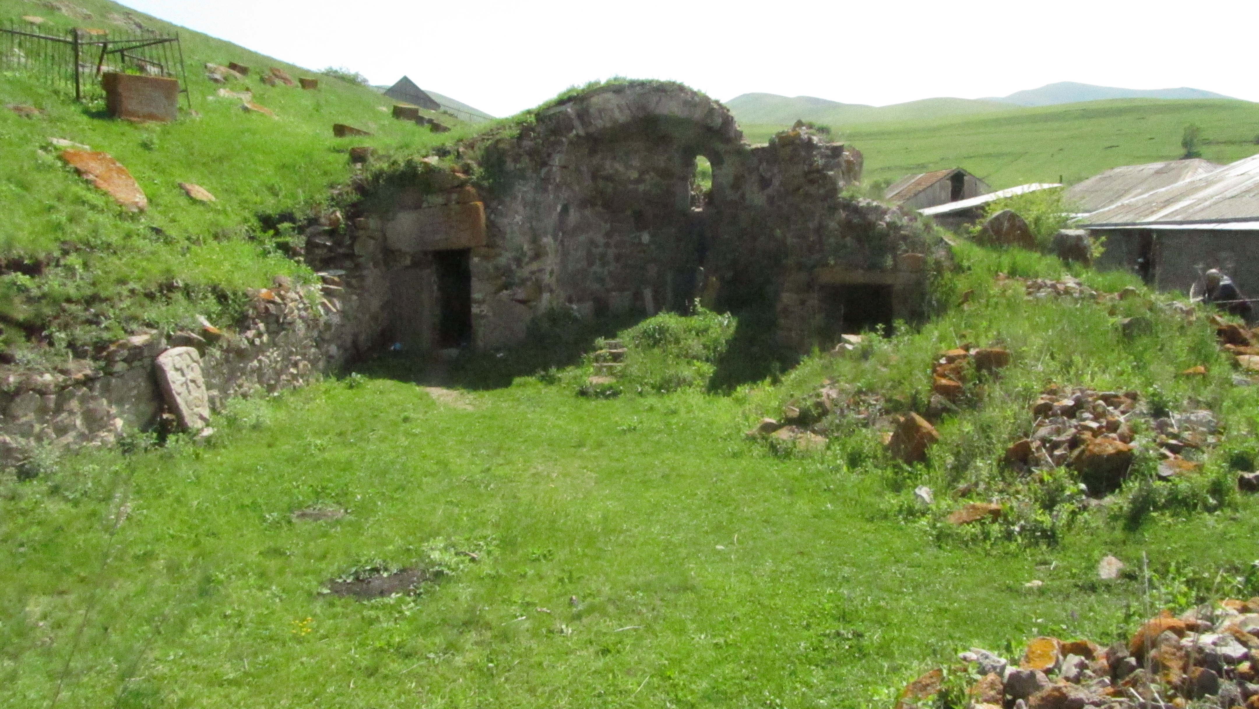 ճամբարակի Սուրգ Գրիգոր եկեղեցին 2/5